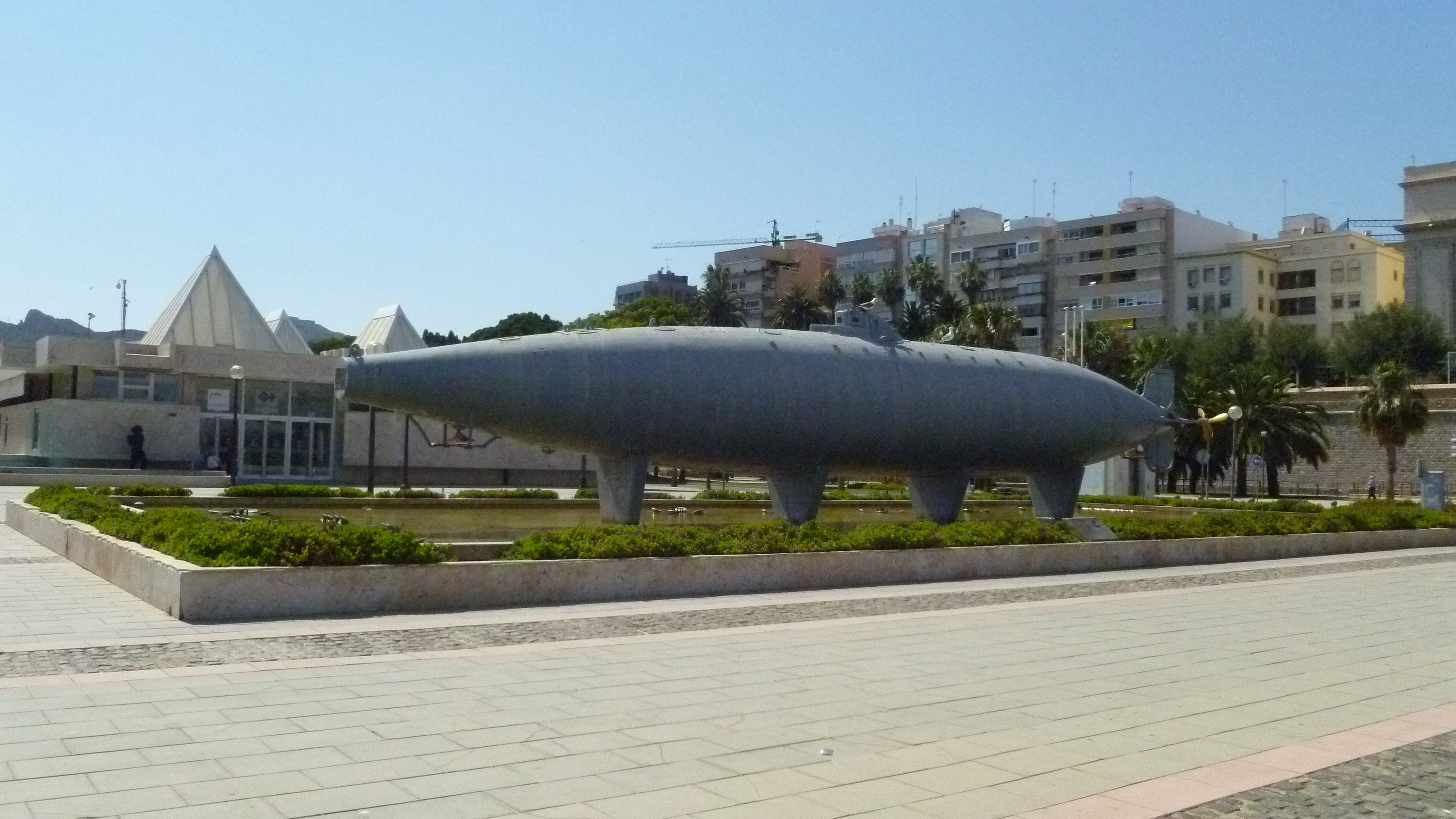 Foto del submarino diseñado por Isaac Peral, situado en el Paseo Alfonso XII de Cartagena